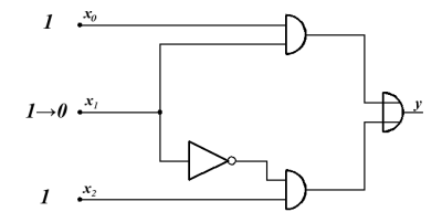 Logische Schaltung mit Hazard